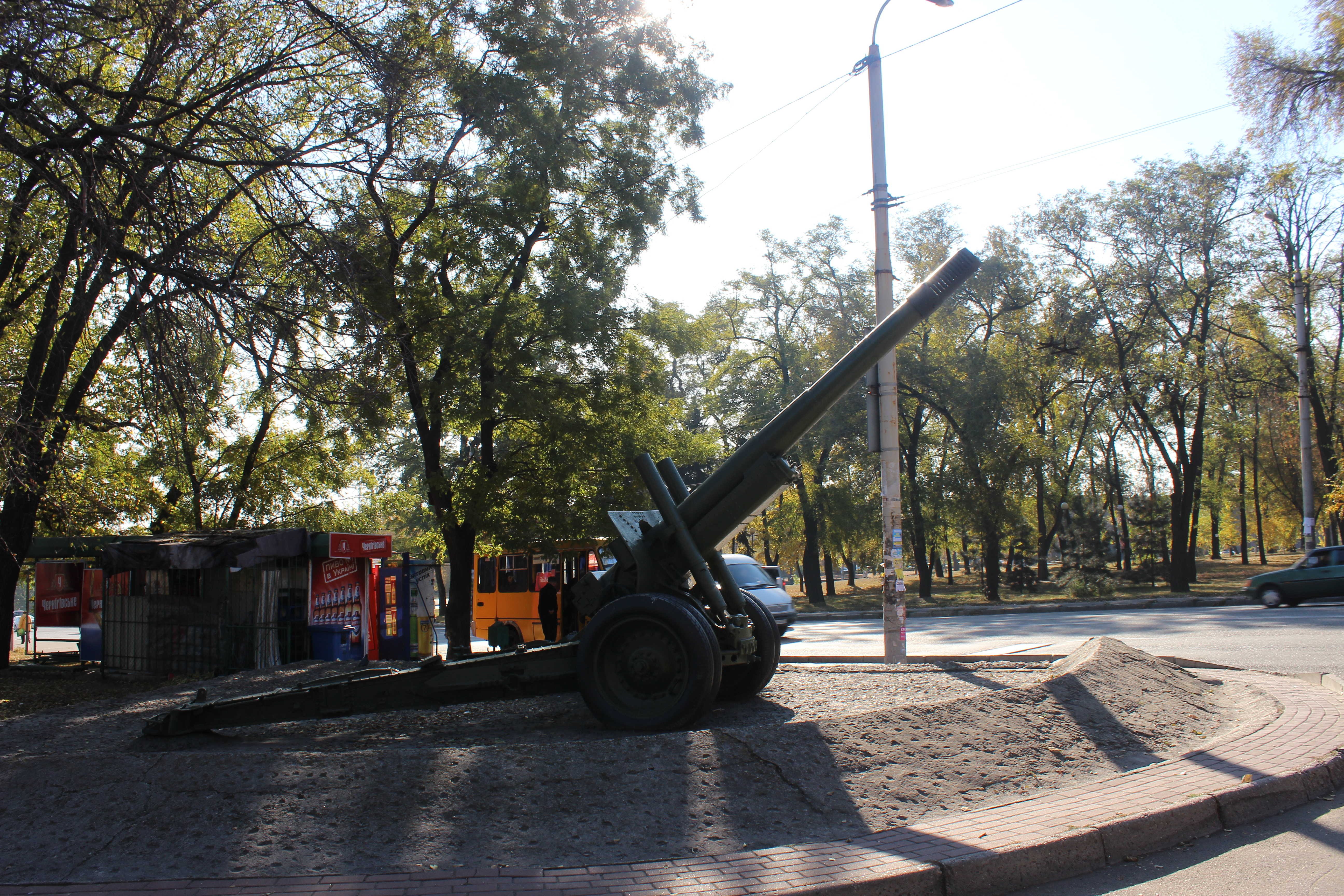 Меморіальний комплекс на честь радянських воїнів, загиблих під час форсування Дніпра, Запоріжжя, вул. Плотинна